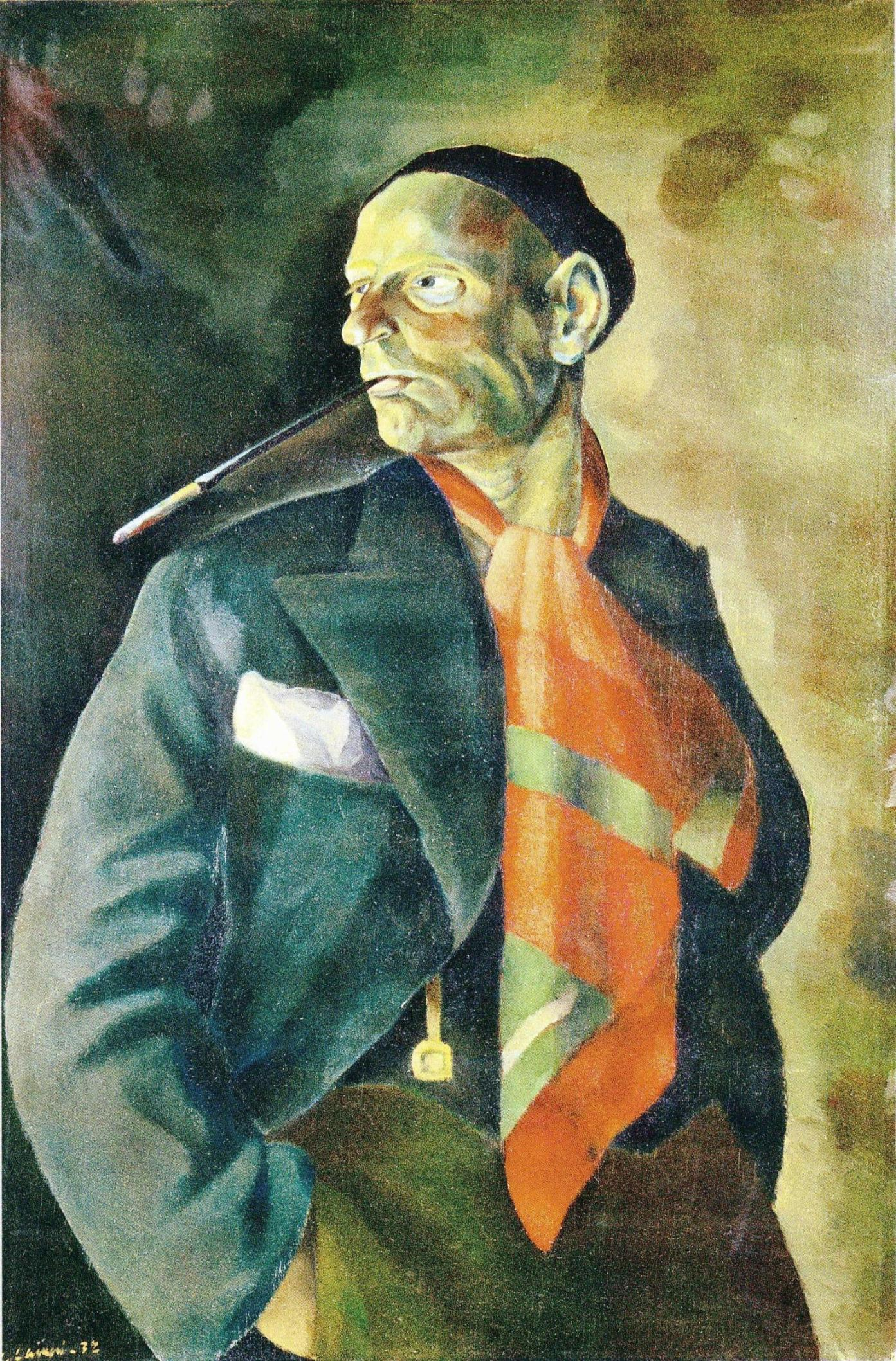 Lammen omakuva vuodelta 1932.